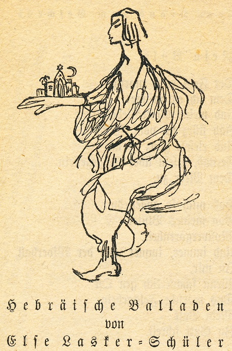 Else Lasker-Schüler: Hebräische Balladen. A. R. Meyer Verlag, Berlin, 1913. Umschlagillustration von der Verfasserin. (Reihe Lyrisches Flugblatt Nr. 25)